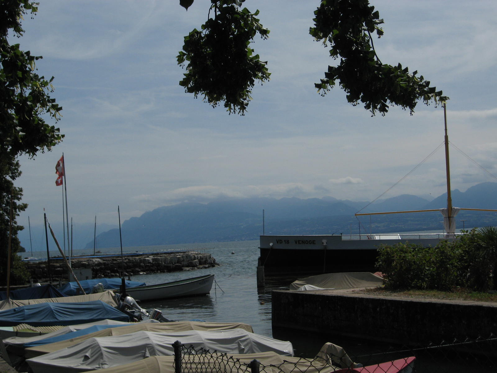 Port de Perroy